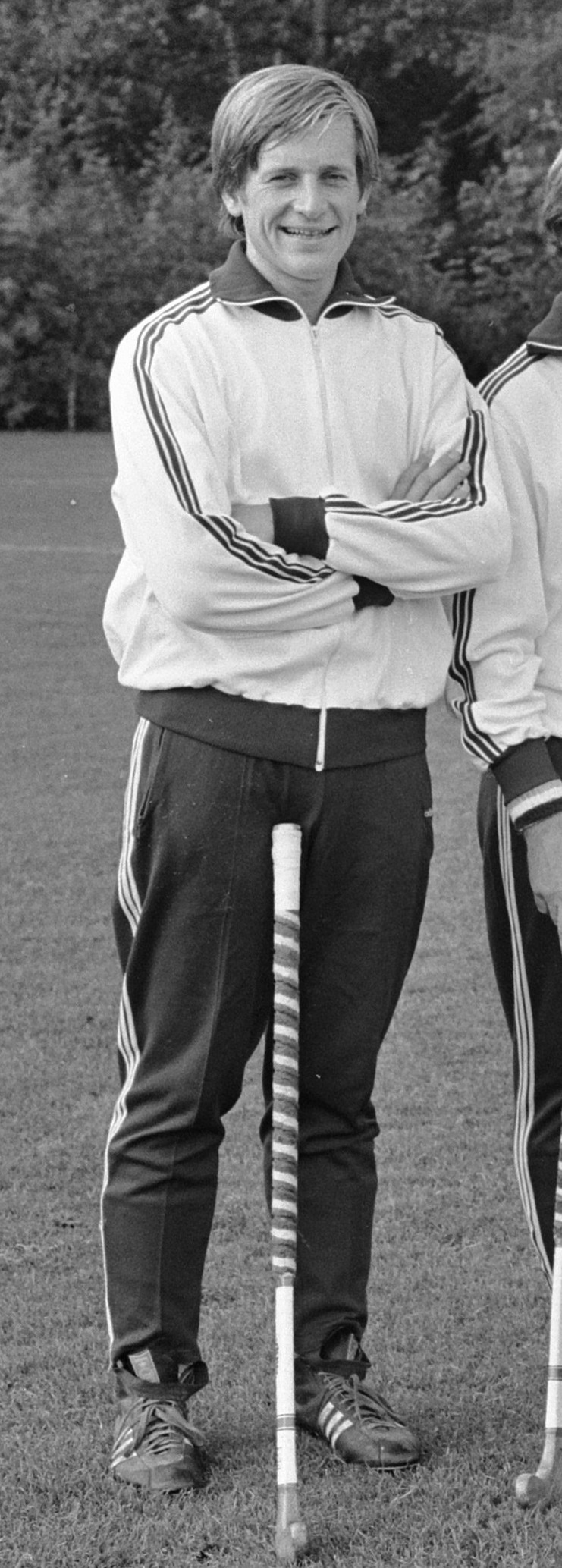 Nederland tegen Belgie 6-0 (hockey); afscheidswedstrijd van Bart Taminiau.